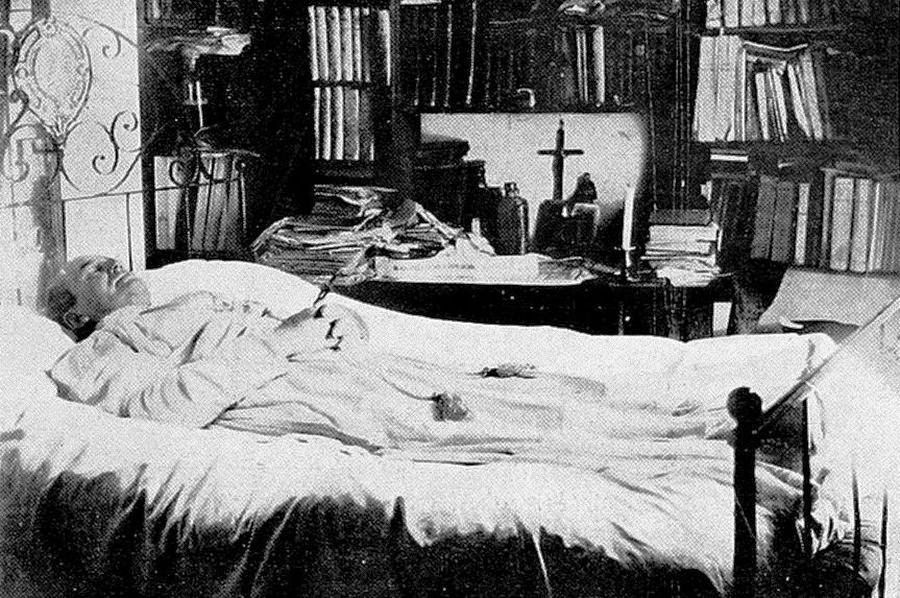 Retrato post mortem de Antonio López Ferreiro.jpg